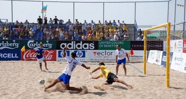 Игра сборных Норвегии и Азербайджана. Игрок сборной Азербайджана по пляжному футболу Вагиф Ширинбеков.